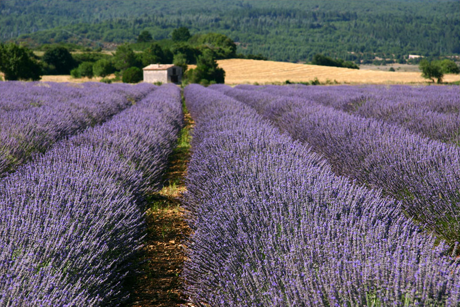 Coltivazioni di lavanda nella piana di Sault, Vaucluse, nella regione Provenza-Alpi-Costa Azzurra (Francia)